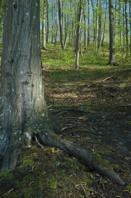 Šrekov vršok, Malé Karpaty, Slovakia